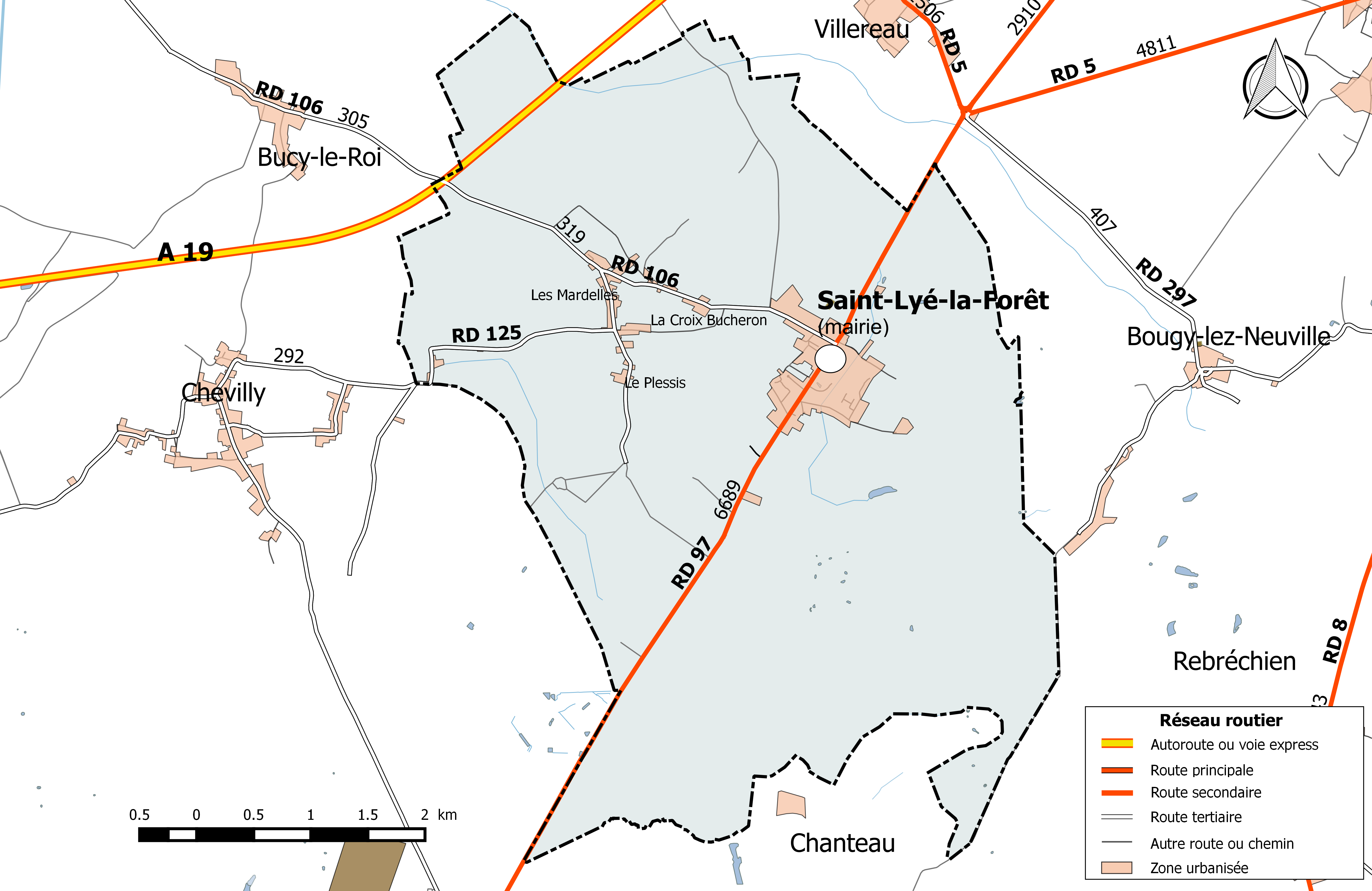 Carte du réseau routier de la commune de Saint-Lyé-la-Forêt.